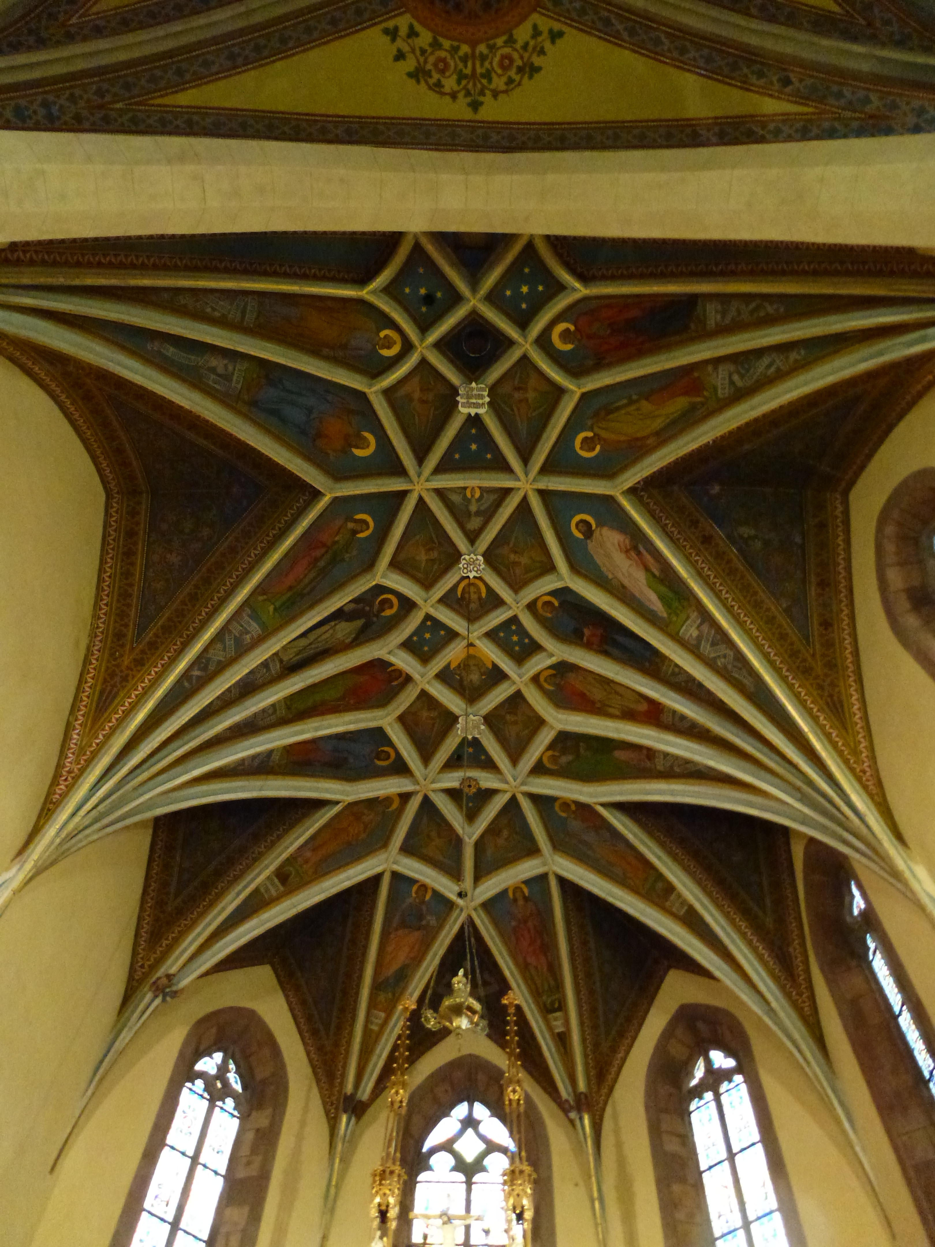 Sieťová klenba presbytéria